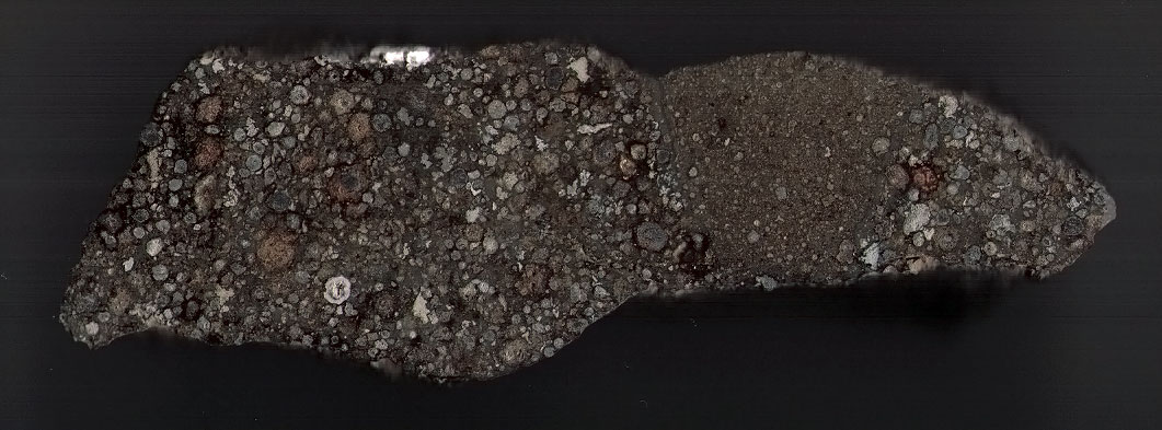 NWA 3118